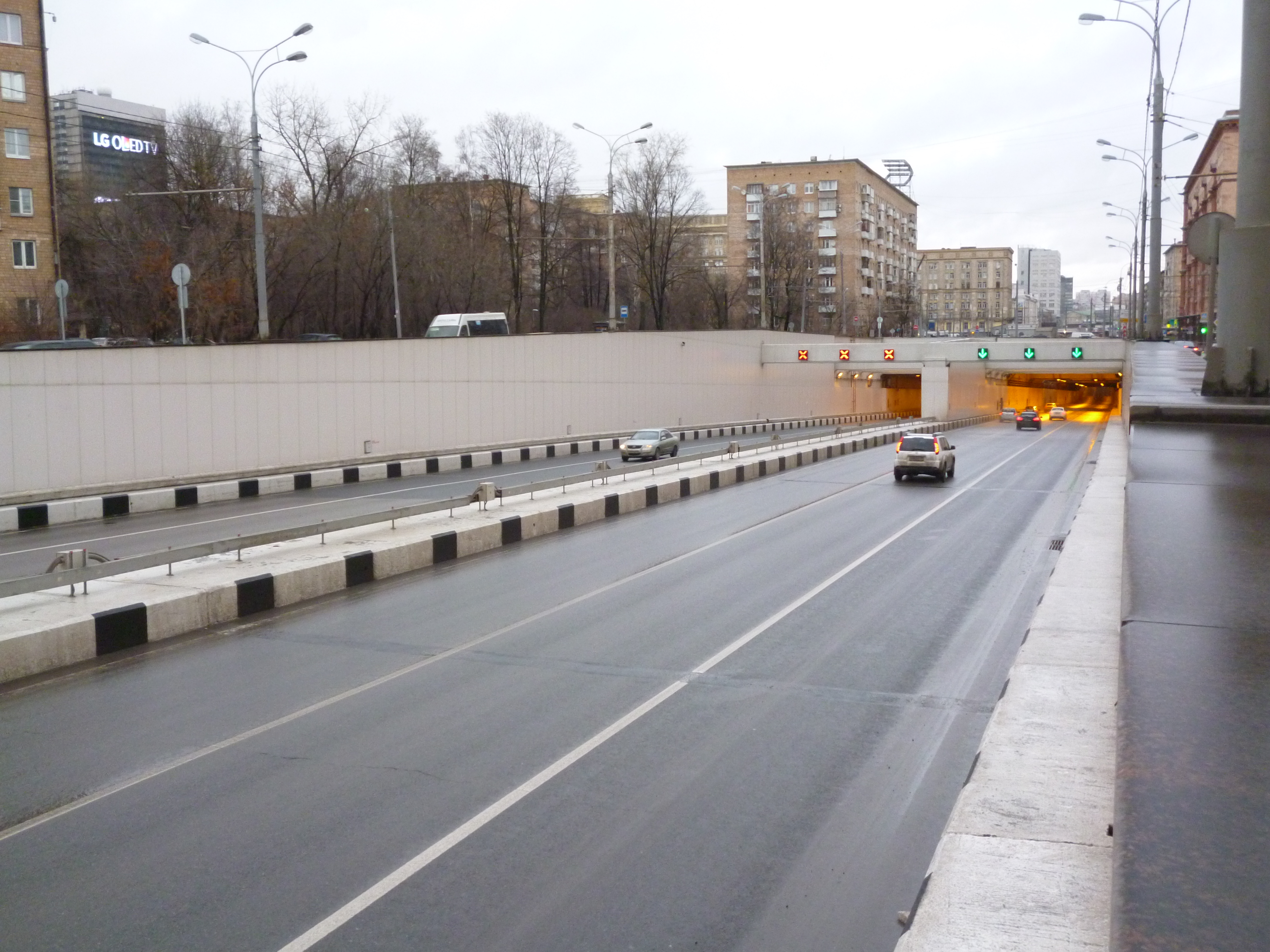 Алабяно-Балтийский тоннель на следующий день после полного открытия